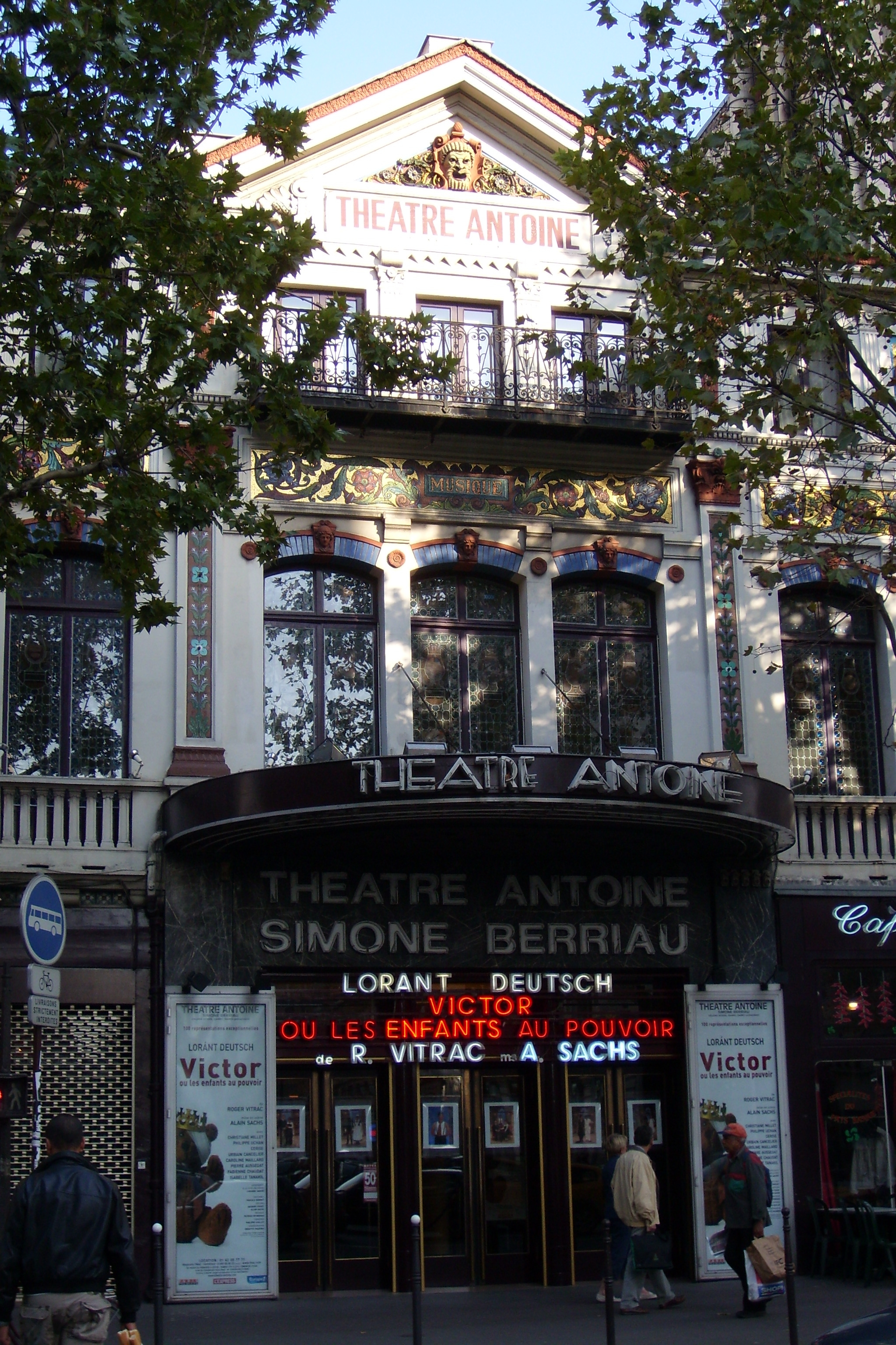 Façade du Théâtre Antoine, Paris